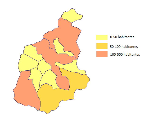 Demografia Comarca Camero Viejo 2015